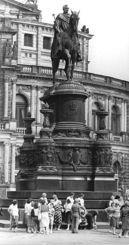 Dresden, Reiterstandbild, König Johann ADN-ZB Häßler 14.7.1989 Dresden: Schöne DDR. Seit 100 Jahren „reitet“ der sächsische König Johann sein Pferd auf dem Dresdner Theaterplatz. Von Johannes Schilling geschaffen und 1889 aufgestellt, hat das bronzene Reiterdenkmal seinen Standort genau am Kreuzungspunkt der Hauptachse von Semperoper und Gemäldegalerie. König Johann machte sich im 19. Jahrhundert unter dem Pseudonym Philalethes als Danteforscher und -übersetzer verdient.